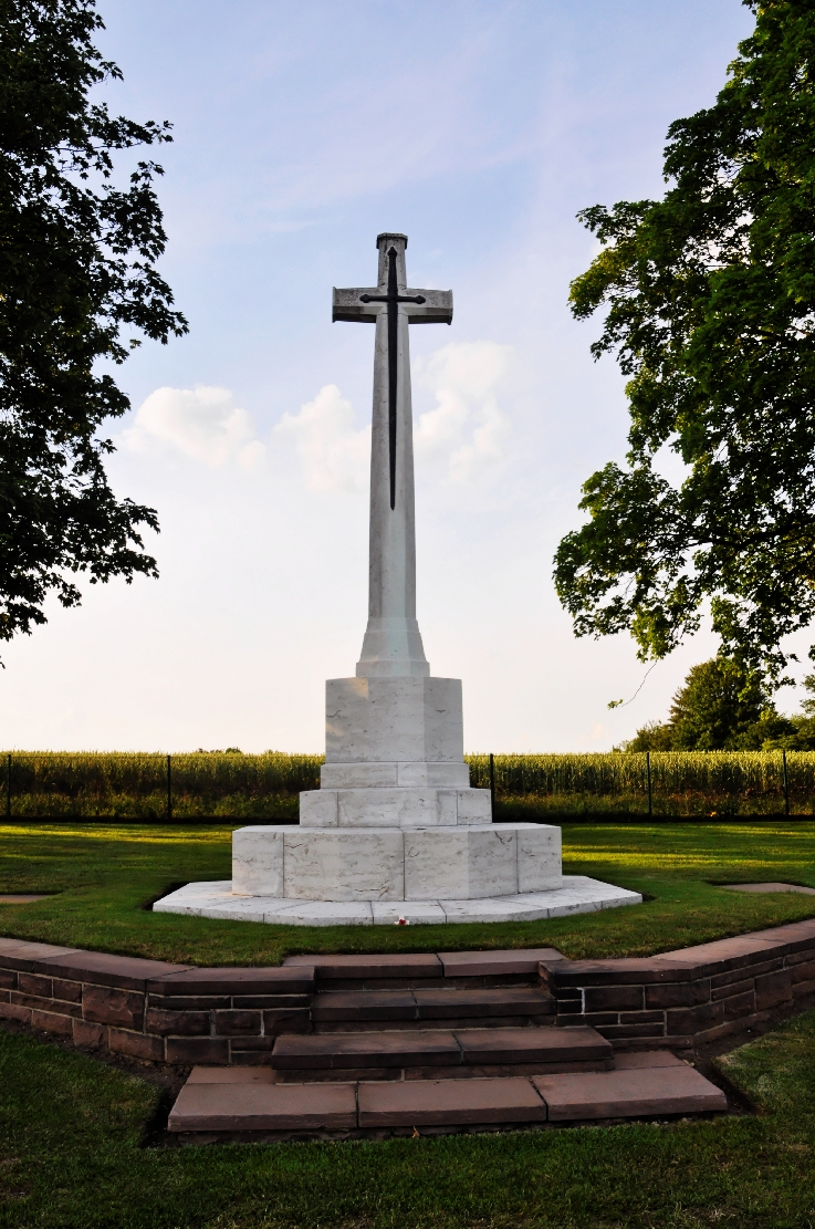 Hannover -Englischer Friedhof bzw War Cemetery